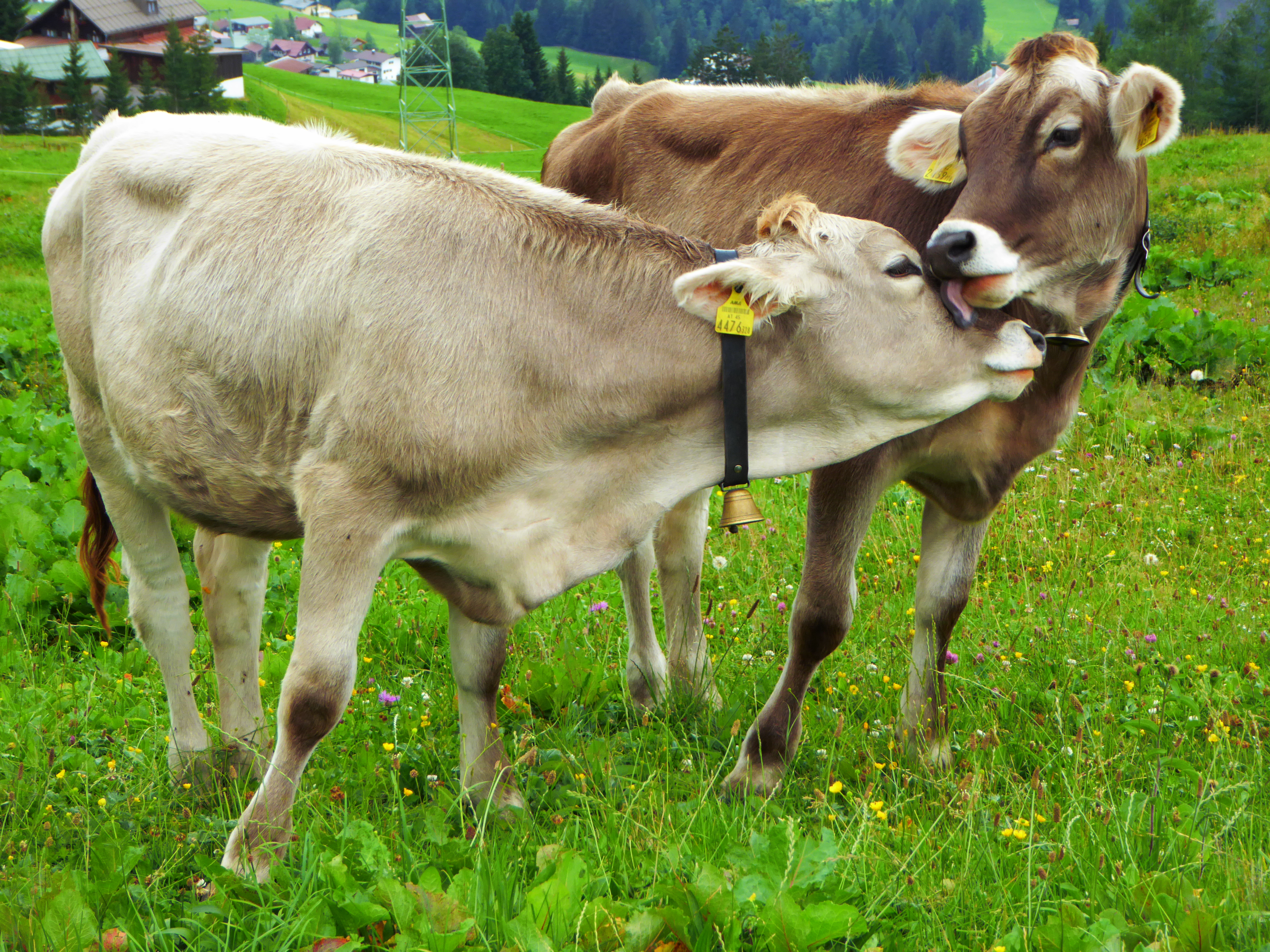 Leck mich: Zärtlichkeit der Rinder